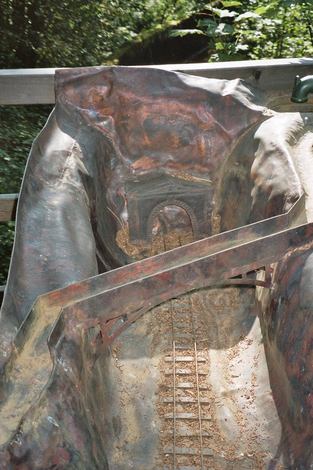 Modell des Heinsberger Tunnels